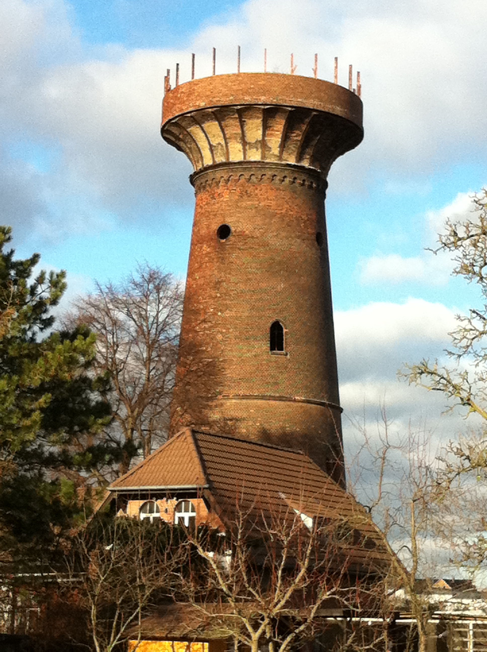 Wasserturm Halle-Diemitz während des Rückbaus im Jahr 2012